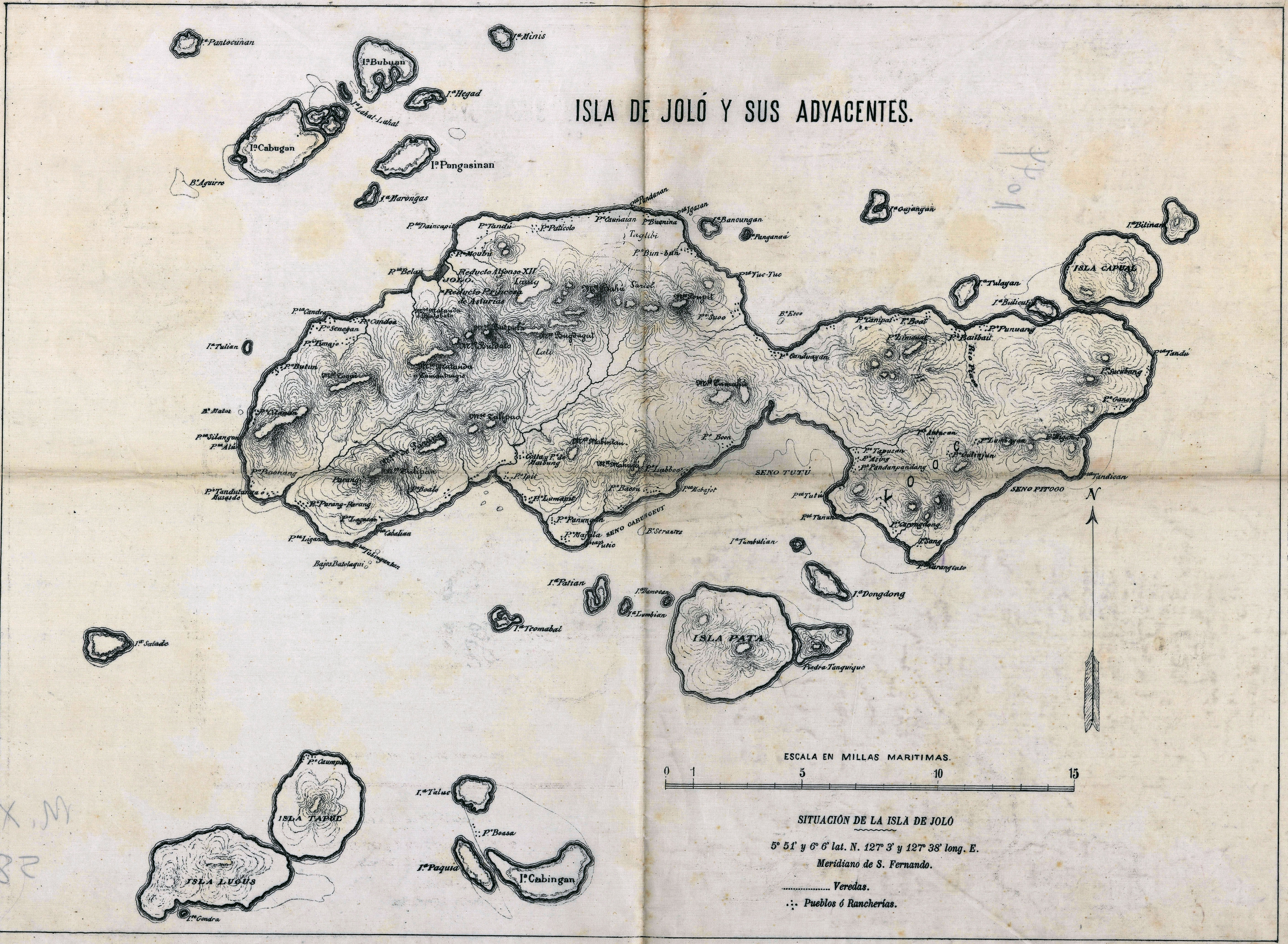 Isla de Joló y su adyacentes, siglo XIX